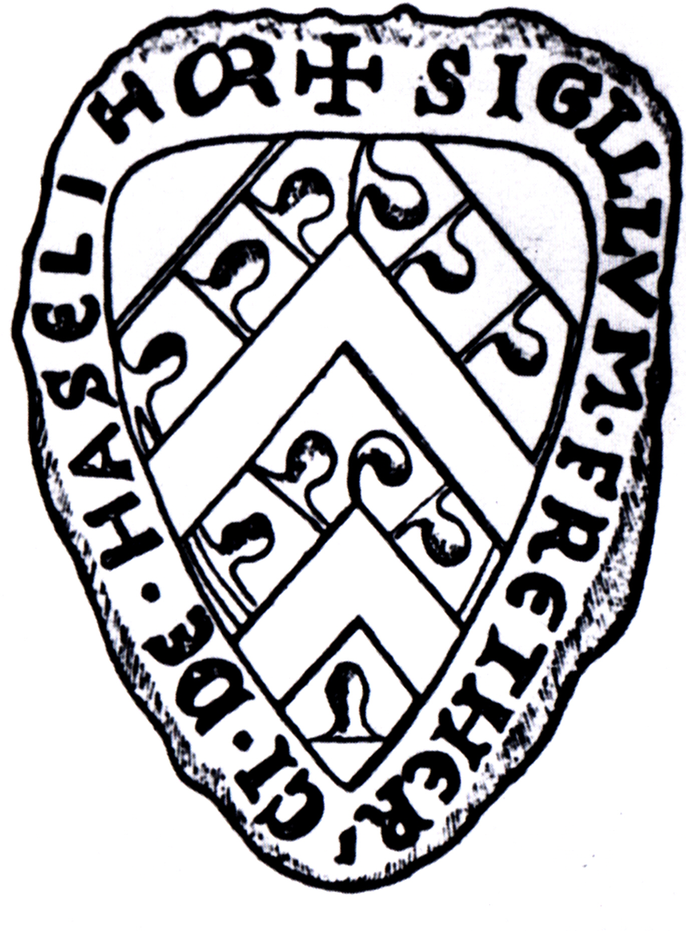 Siegel der Familie Ritter von Haseldorf. Das Siegel stammt aus der Zeit um 1255.